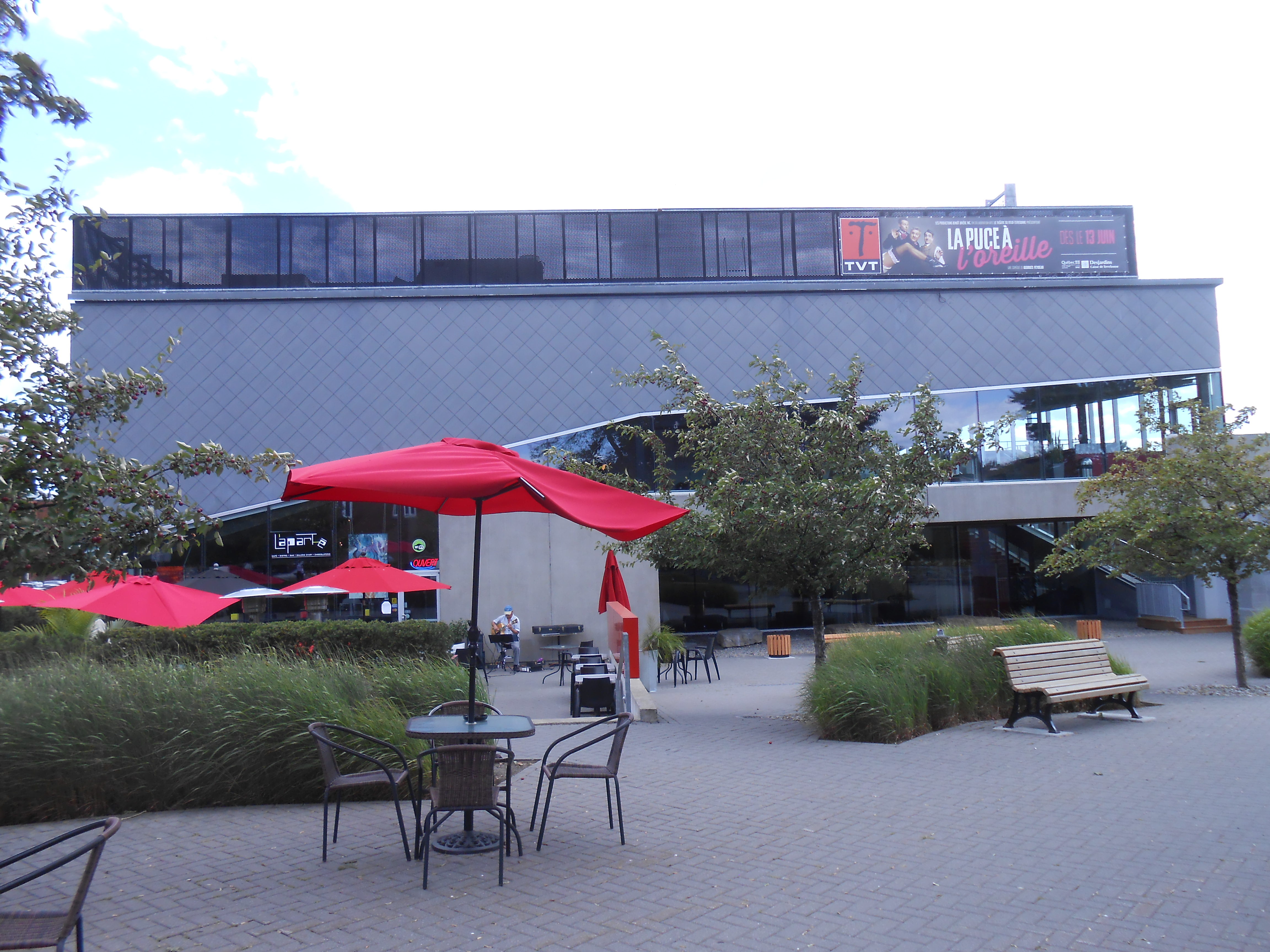 Théâtre du Vieux-Terrebonne, 866, rue Saint-Pierre, Terrebonne